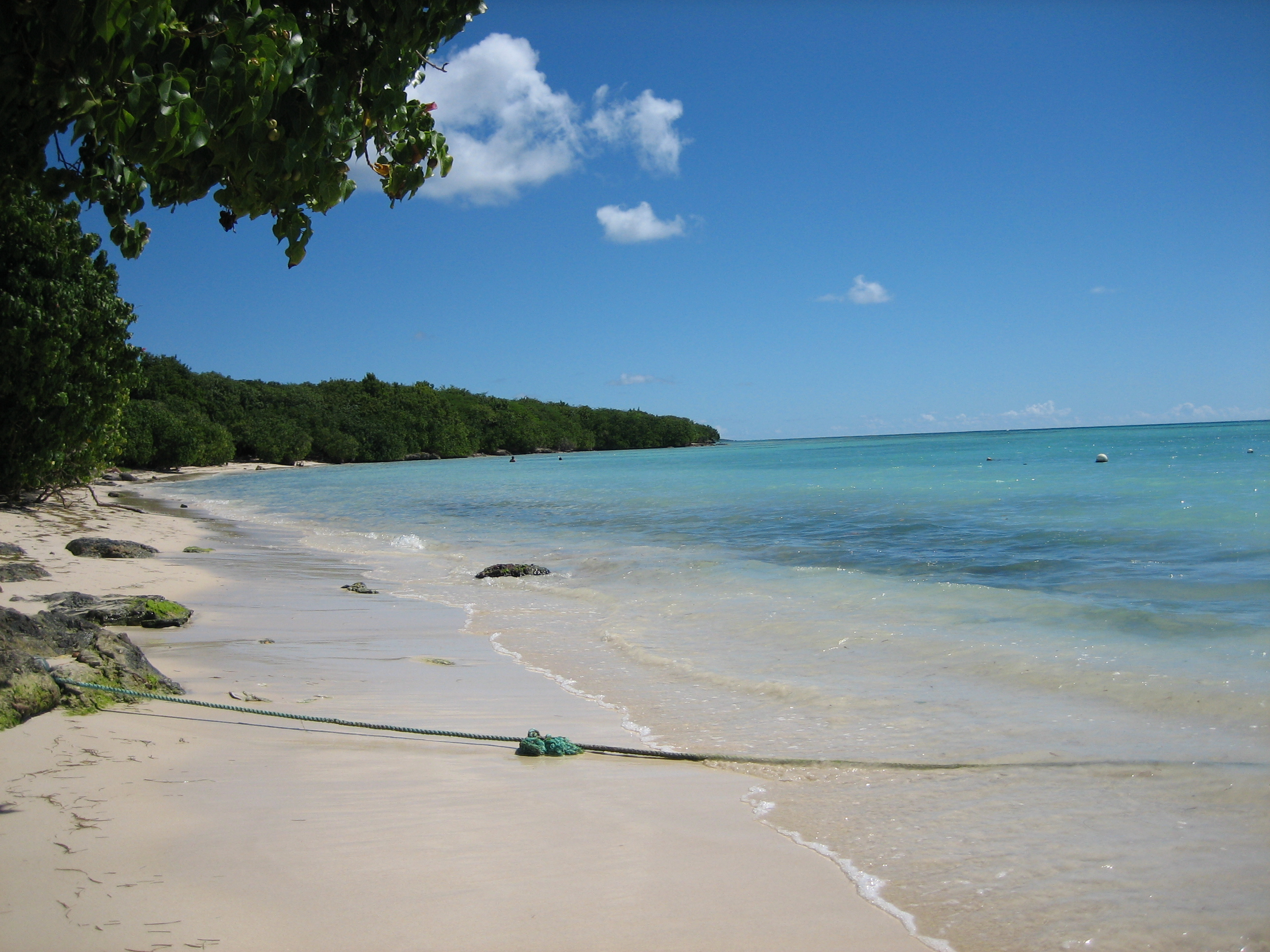 Une des nombreuses plage sauvage de Grande-terre sur la route de la pointe des chateaux.